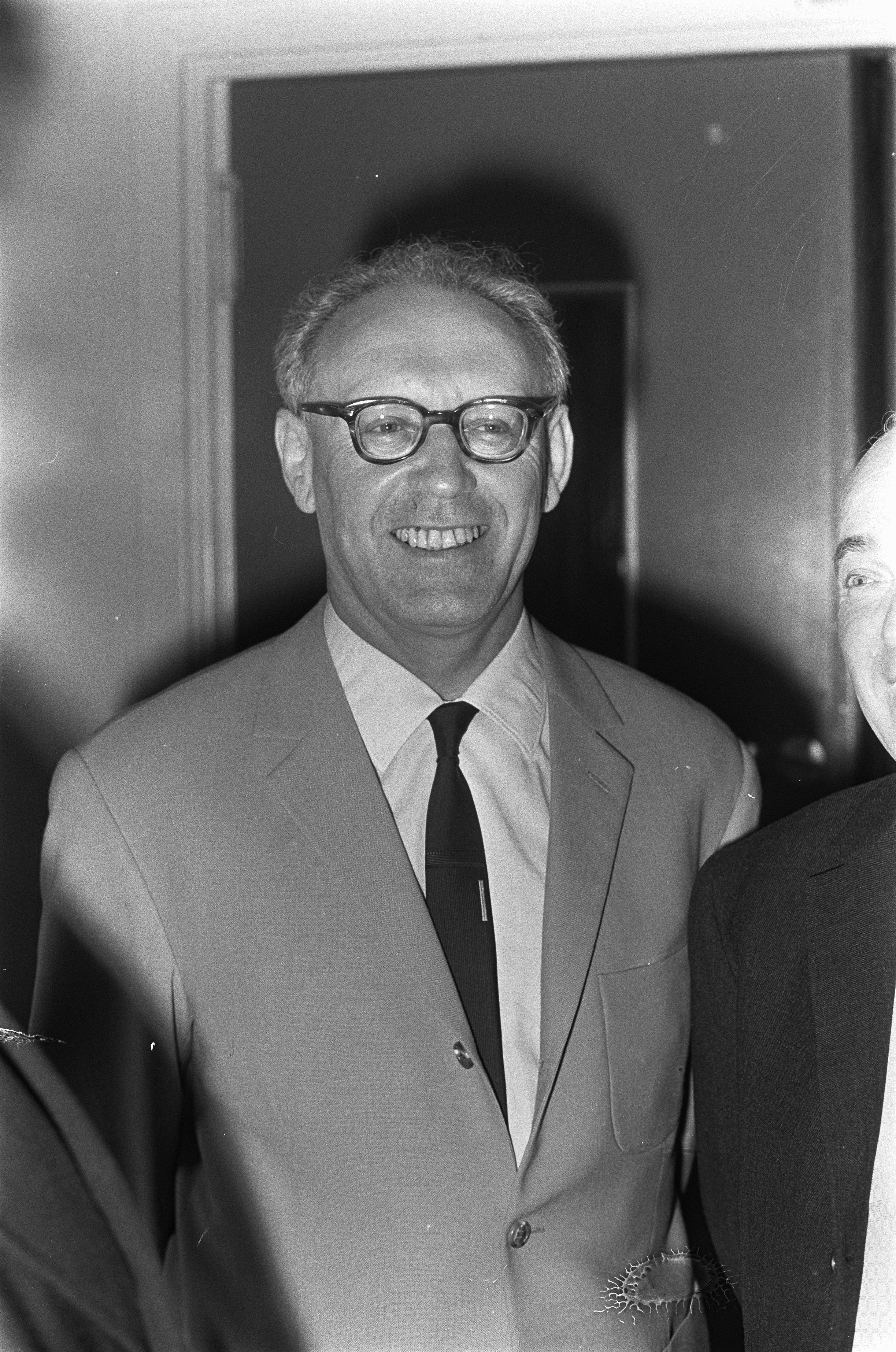 Collectie / Archief : Fotocollectie Anefo Reportage / Serie : [ onbekend ] Beschrijving : IBM-schaaktoernooi geopend Datum : 4 juli 1966 Trefwoorden : schaken Fotograaf : Nijs, Jac. de / Anefo Auteursrechthebbende : Nationaal Archief Materiaalsoort : Negatief (zwart/wit) Nummer archiefinventaris : bekijk toegang 2.24.01.05 Bestanddeelnummer : 919-3196